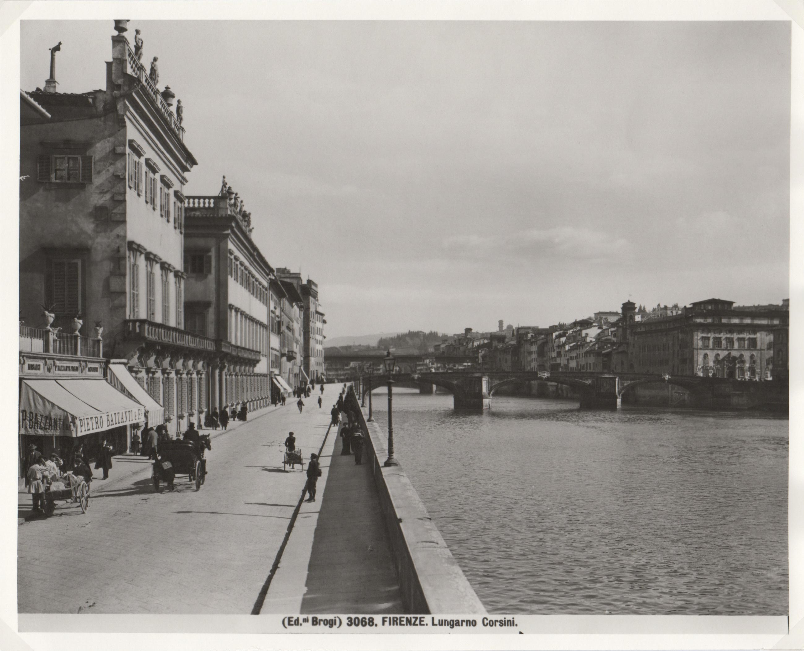 Veduta della Galleria Pietro Bazzanti e Figlio sul Lungarno Corsini